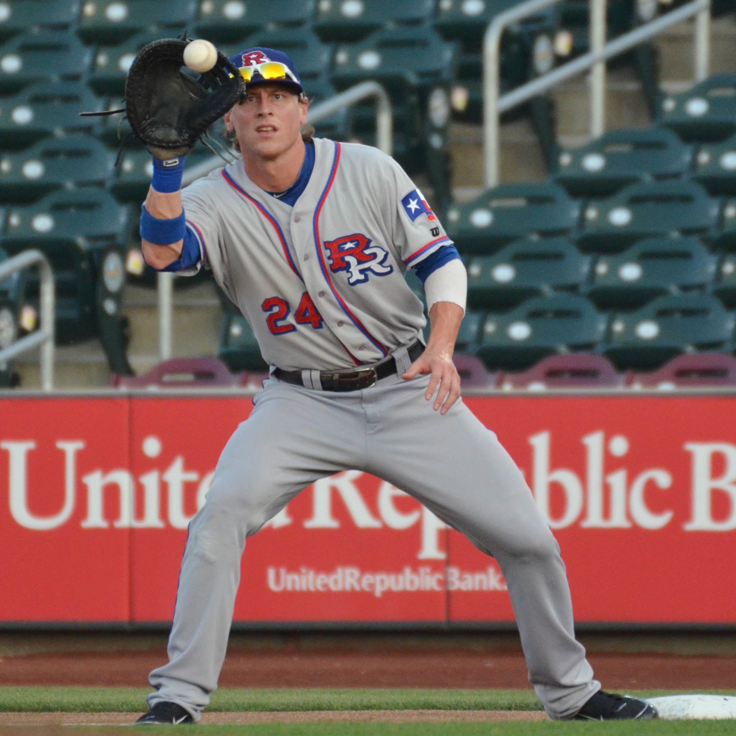 Jim Adduci